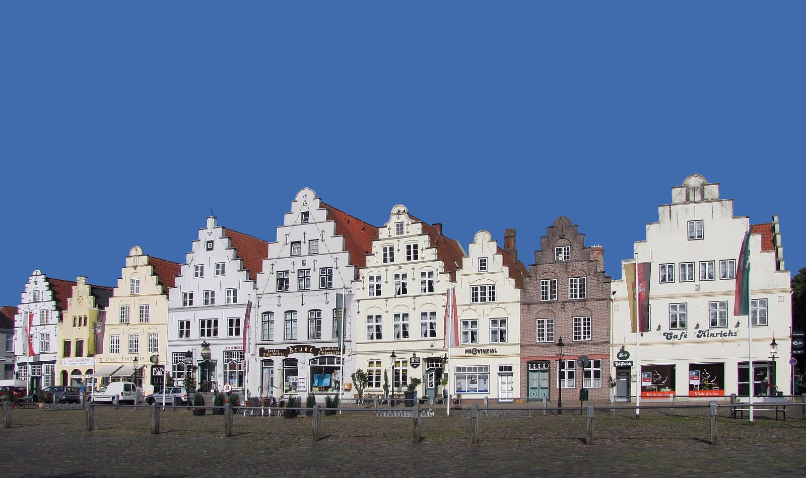 vollständiges Ensemble mit allen 9 Treppengiebel-Häusern Am Markt Westseite (teilweise Kulturdenkmale) Friedrichstadt Holländerstädtchen Nordfriesland Schleswig-Holstein - Foto 2012 Wolfgang Pehlemann IMG_2717